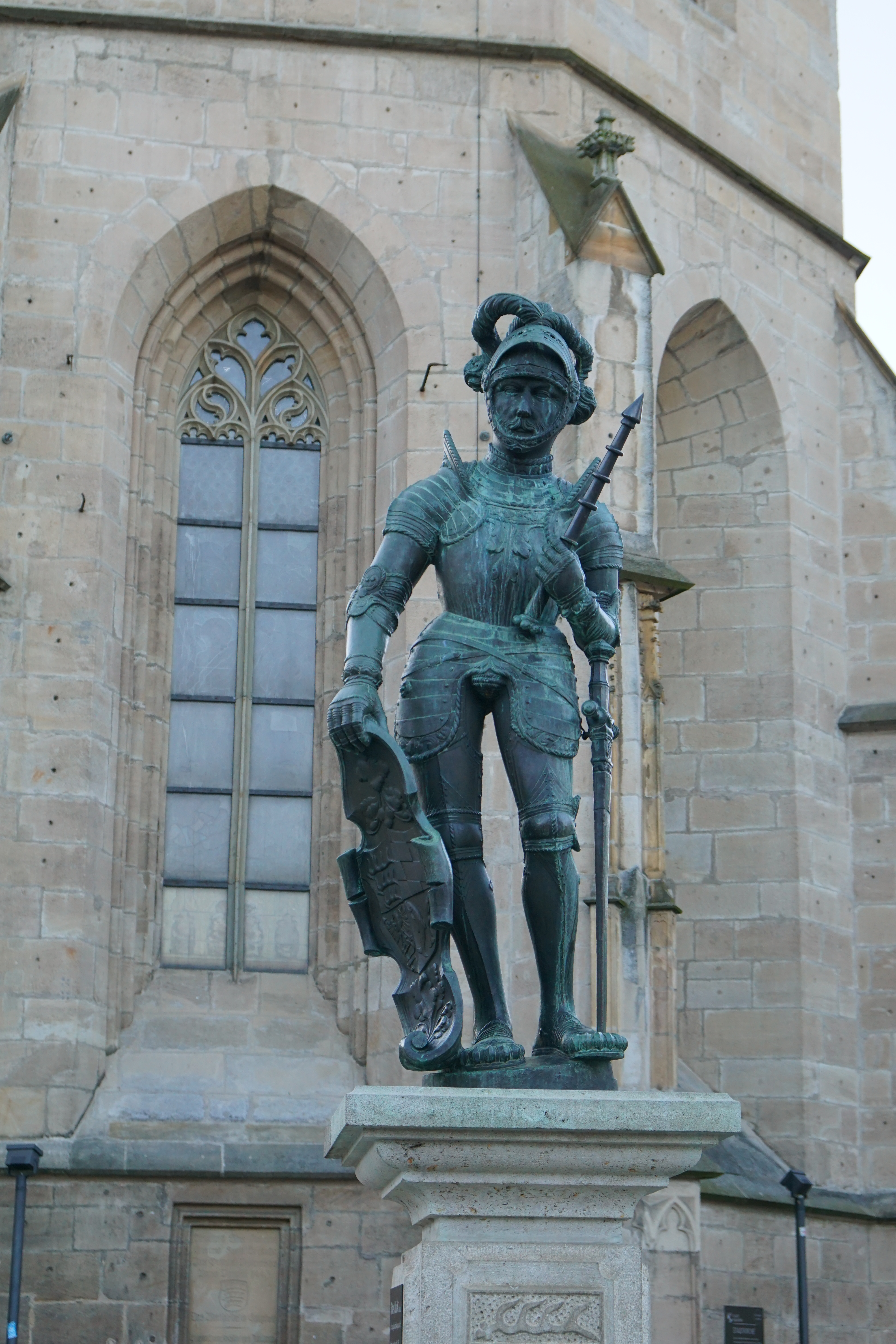 Marktbrunnen vor der Stadtkirche Balingen. Bronzeabguss der originalen Sandsteinfigur.